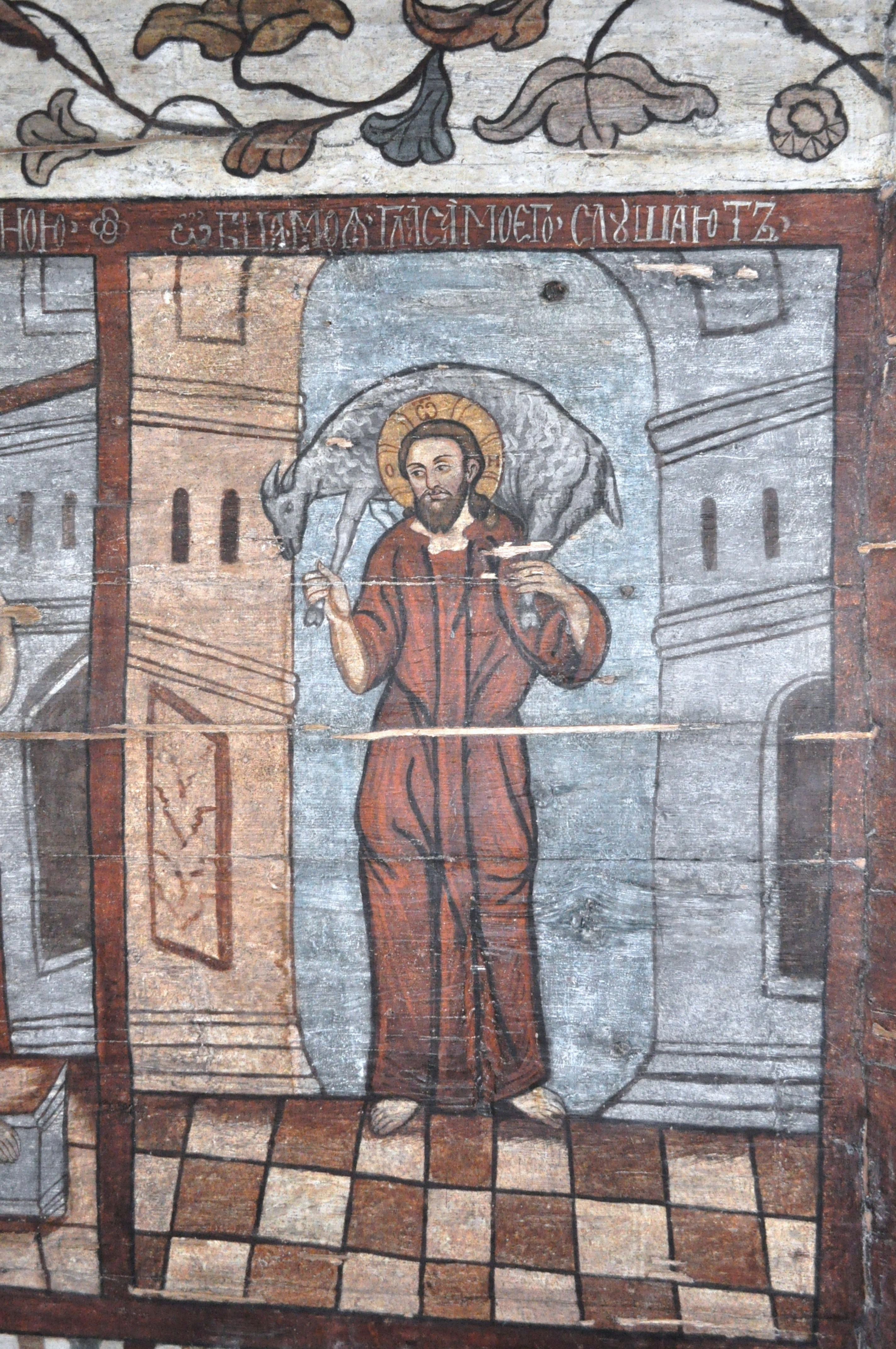 Biserica de lemn "Sfântul Nicolae", sat BOGDAN VODĂ